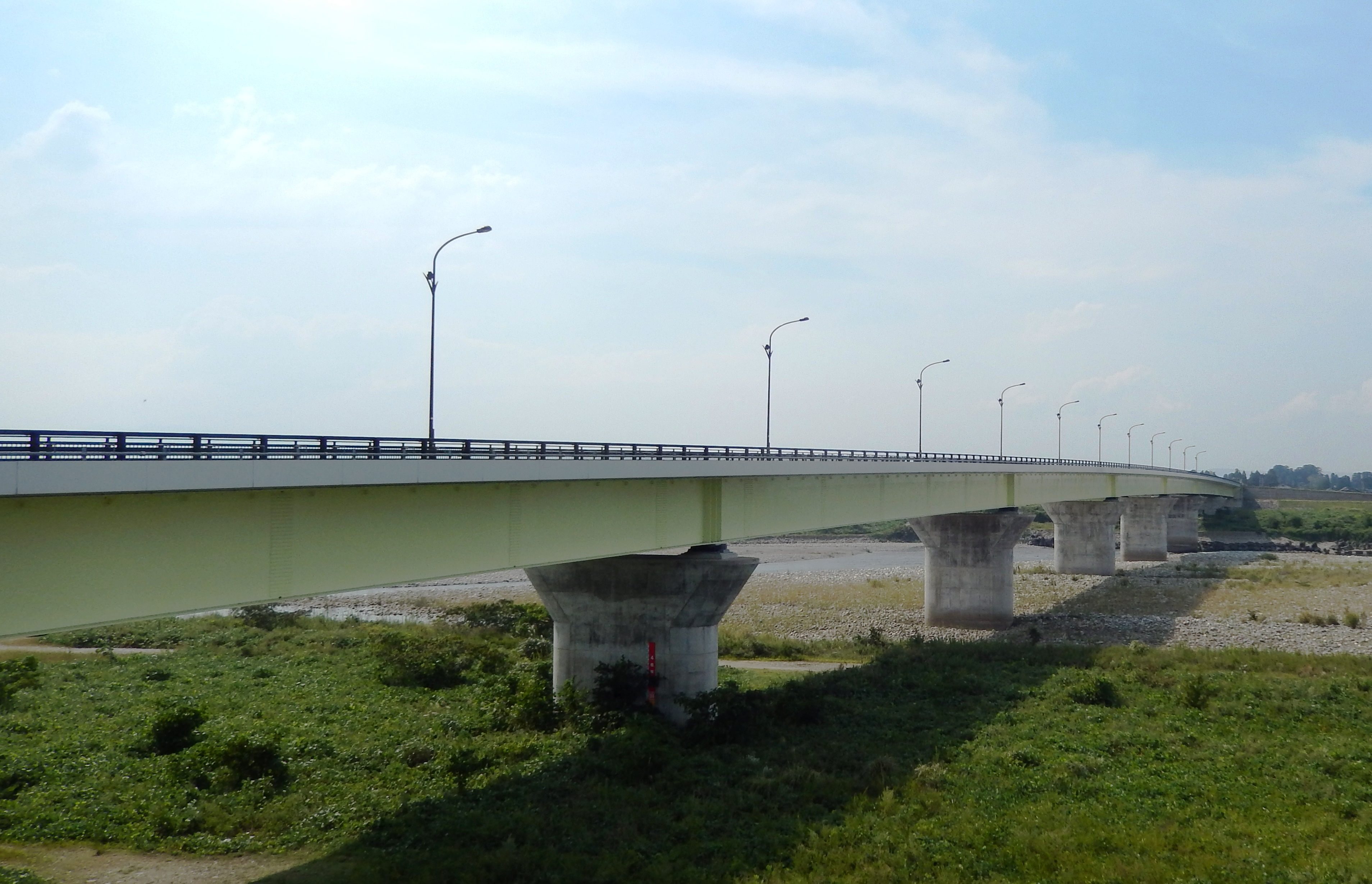 となみ野大橋